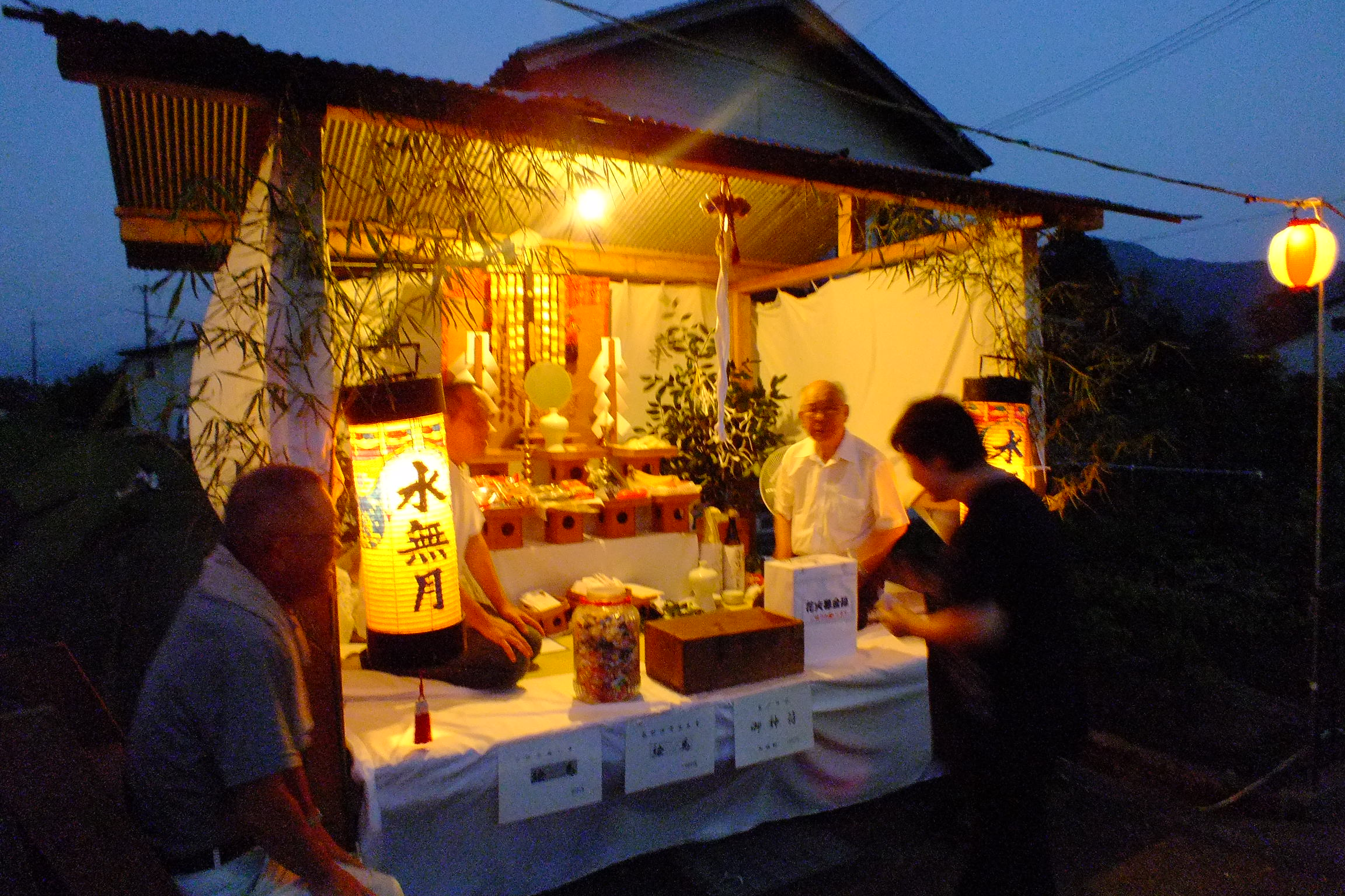 2015-07-31Minazuki-Festival Kokuryo,Tamba,Hyogo-Japan 国領水無月祭り